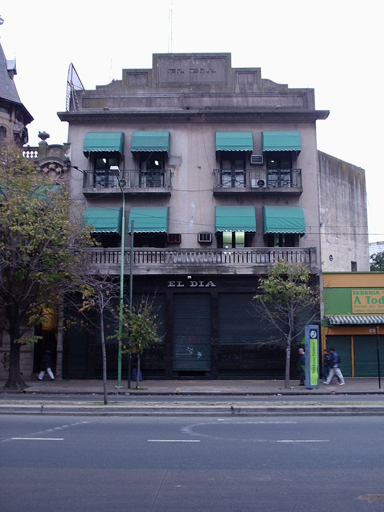 Editorial bureau, El Día. La Plata, Argentina. ([1])